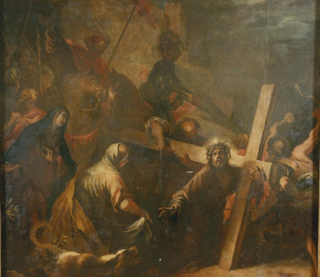 La obra representa a Jesucristo cargando con la cruz y dirigiéndose al Monte Calvario, donde sería crucificado.